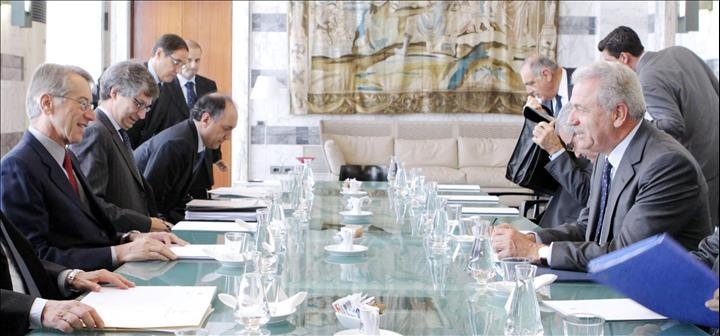 Συνάντηση ΥΠΕΞ Δ. Αβραμόπουλου με ΥΠΕΞ Ιταλίας G. Terzi (Ρώμη, 7.8.2012) Πηγή: ANSA